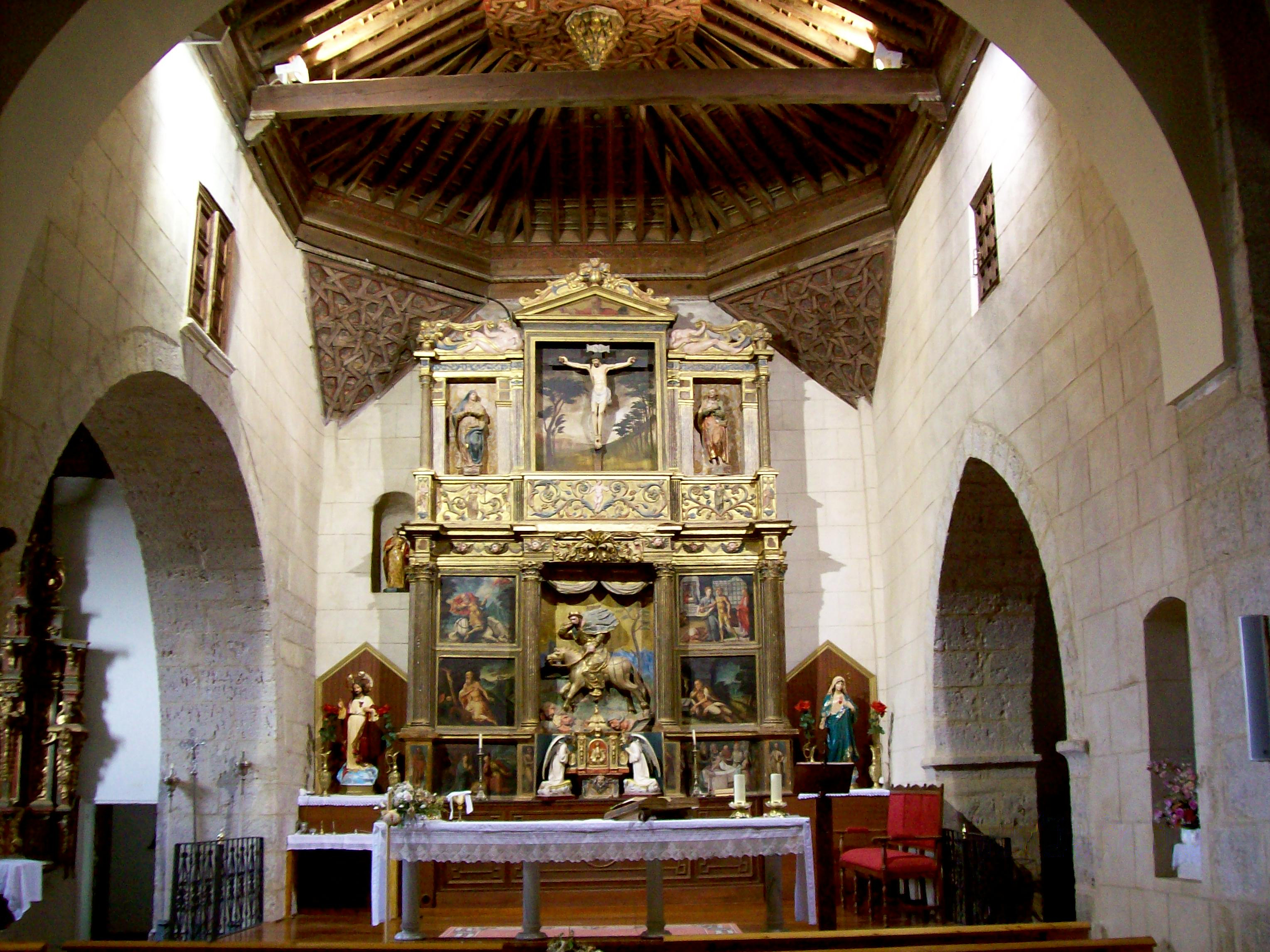 Panorámica del retablo mayor de la iglesia parroquial de Santiago Apóstol en Calzada de los Molinos, Palencia, España